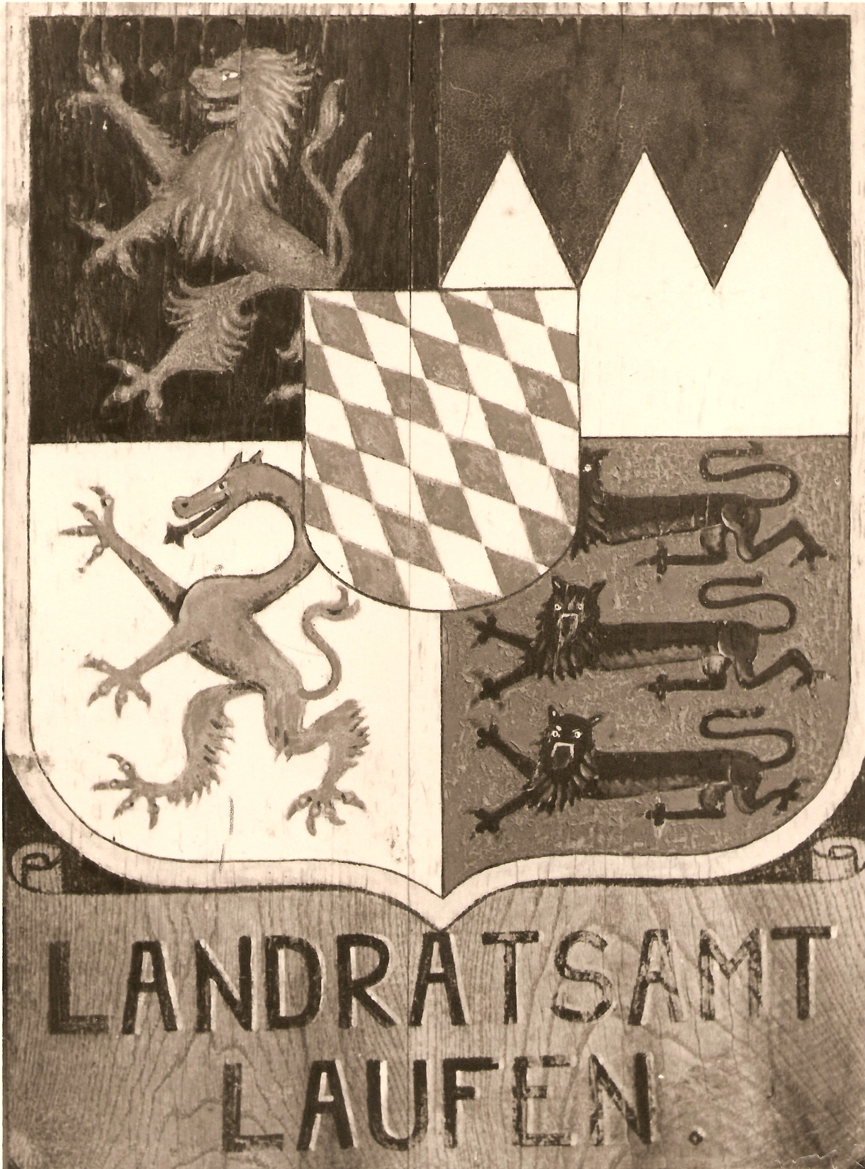 Das Wappenschild am Landratsamt Laufen.